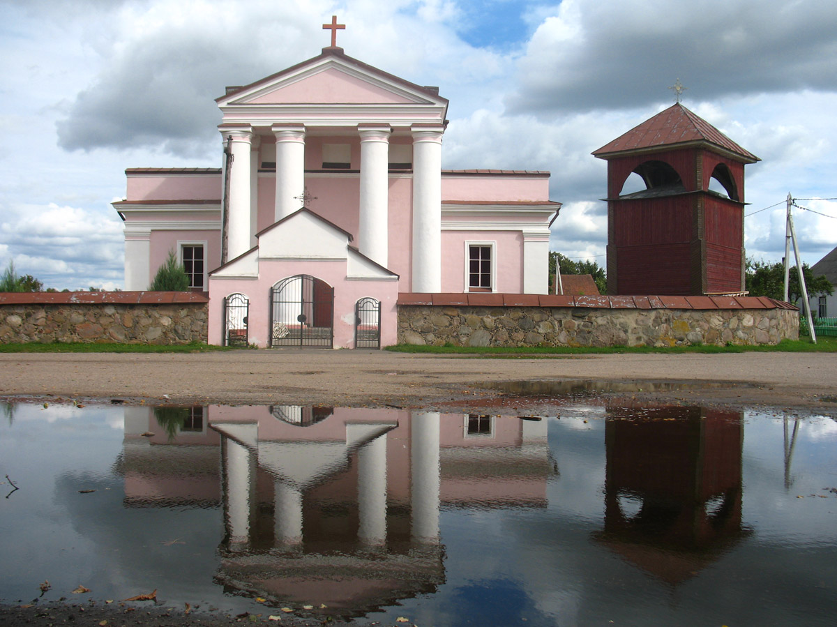 Беларуская (тарашкевіца): Даўгінаў